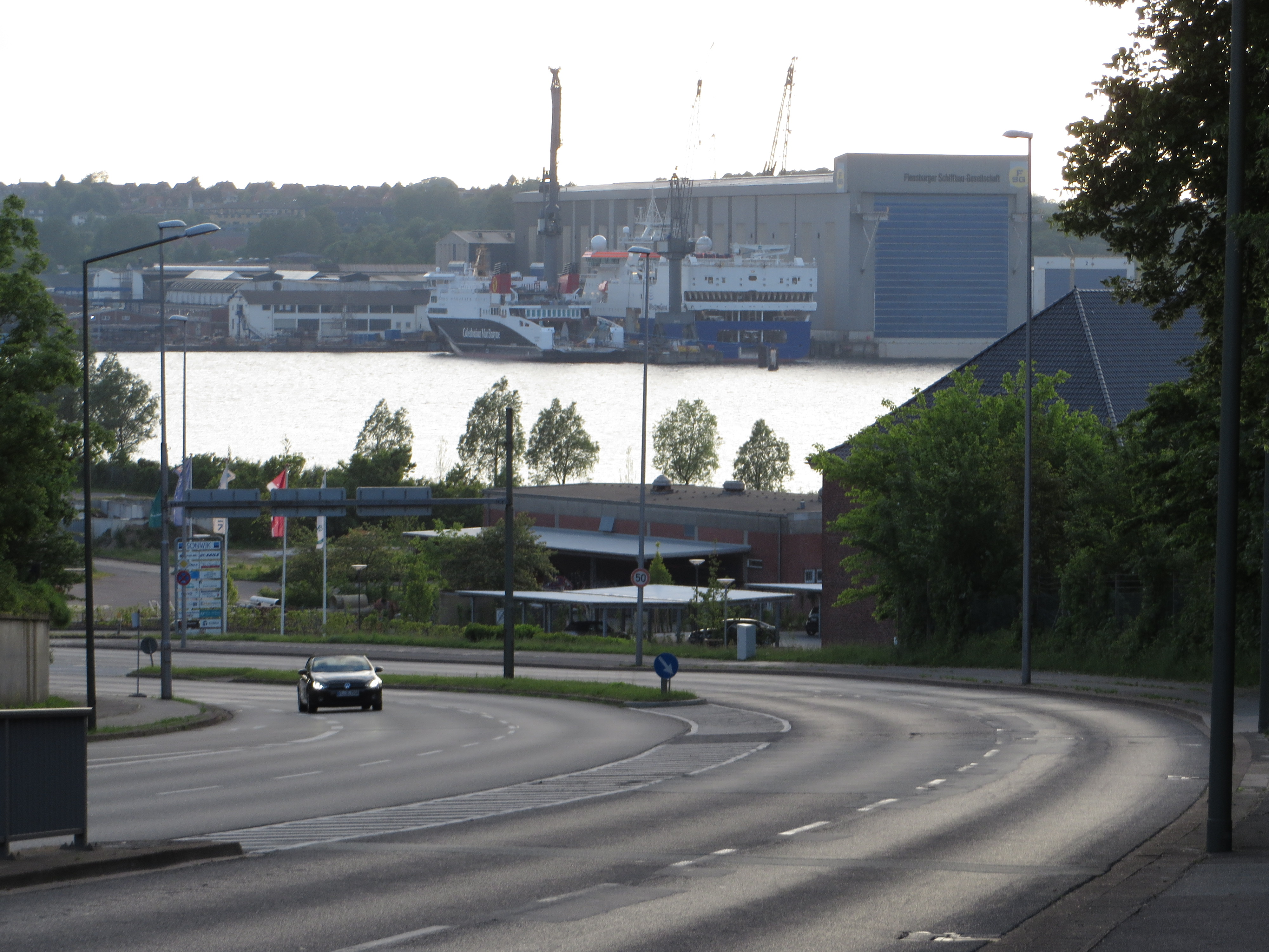 Die Ziegeleistraße runter nach Kielseng und Sonwik mit der Flensburger Werft im Hintergrund (Flensburg)